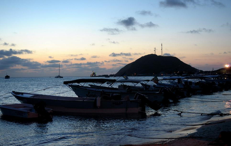 Atardecer en Los Roques Venezuela